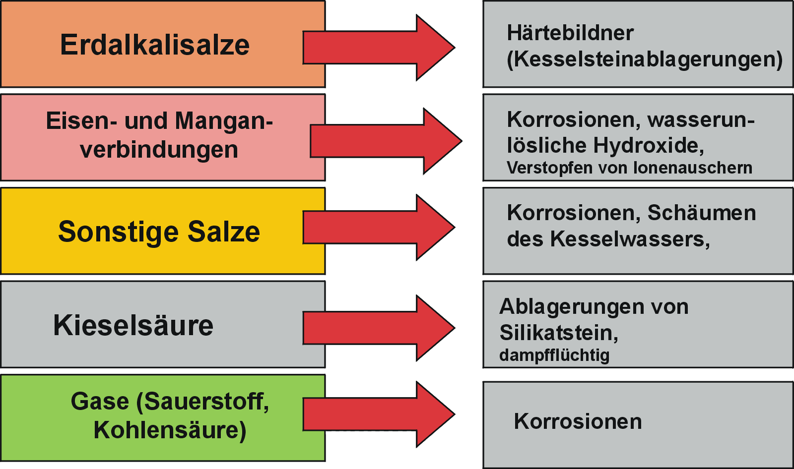 Wirkung der Bestandteile im Rohwasser